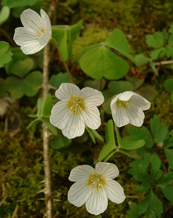 Oxalis acetosella : Oxalis petite oseille, Gy, avril 2004, licence GFDL